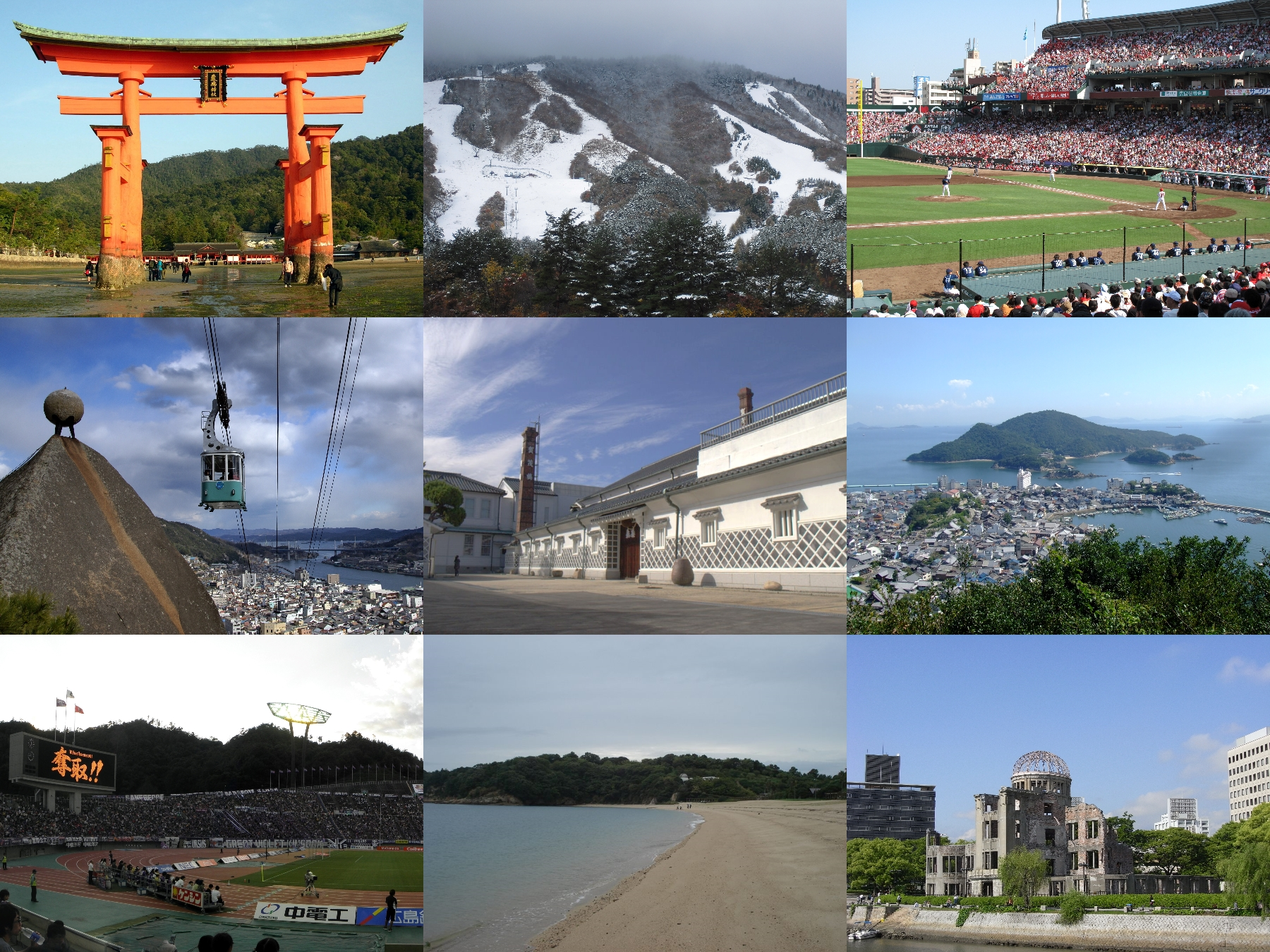 広島県・モンタージュ画像